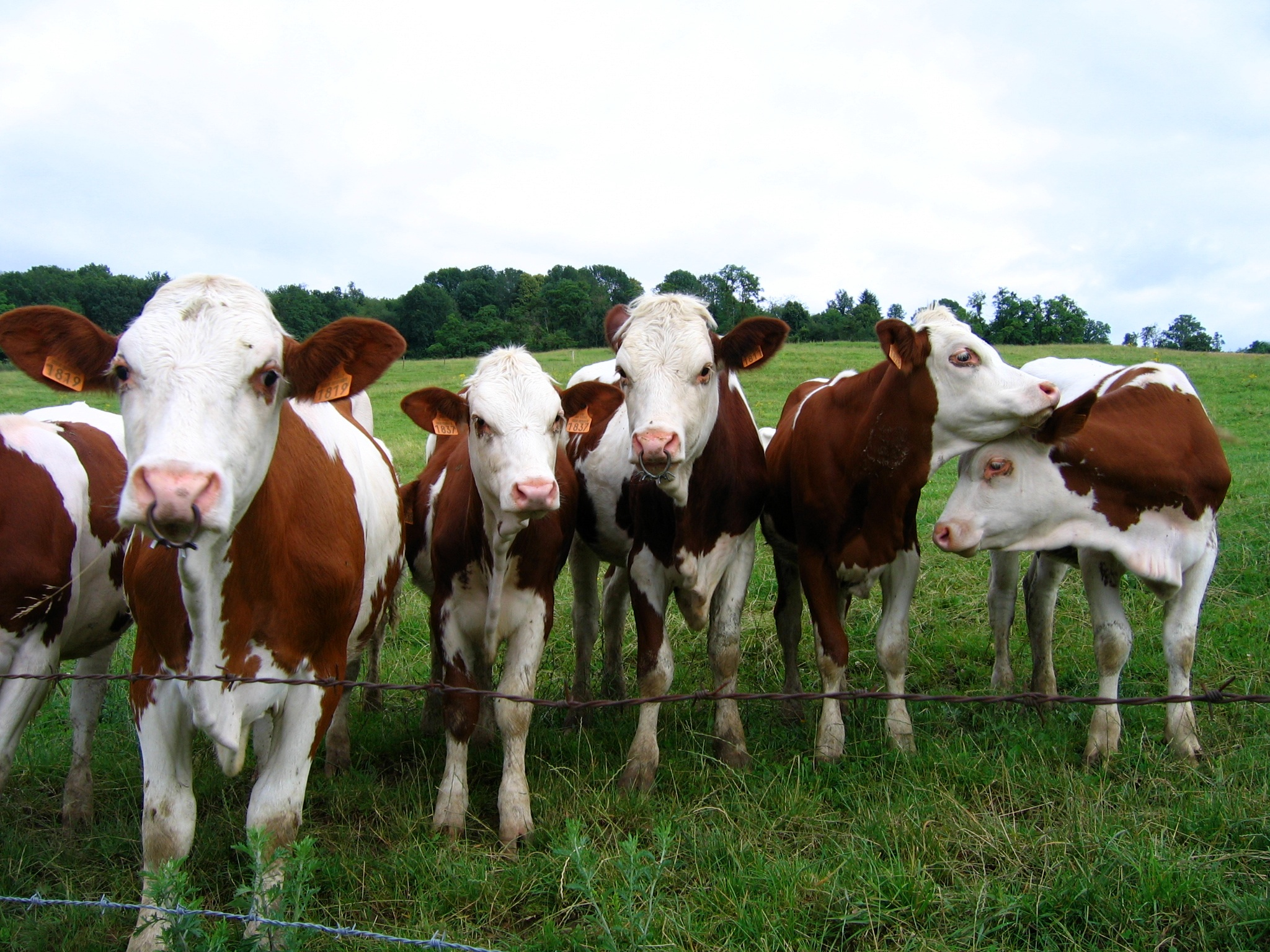 Vaches de race montbéliarde